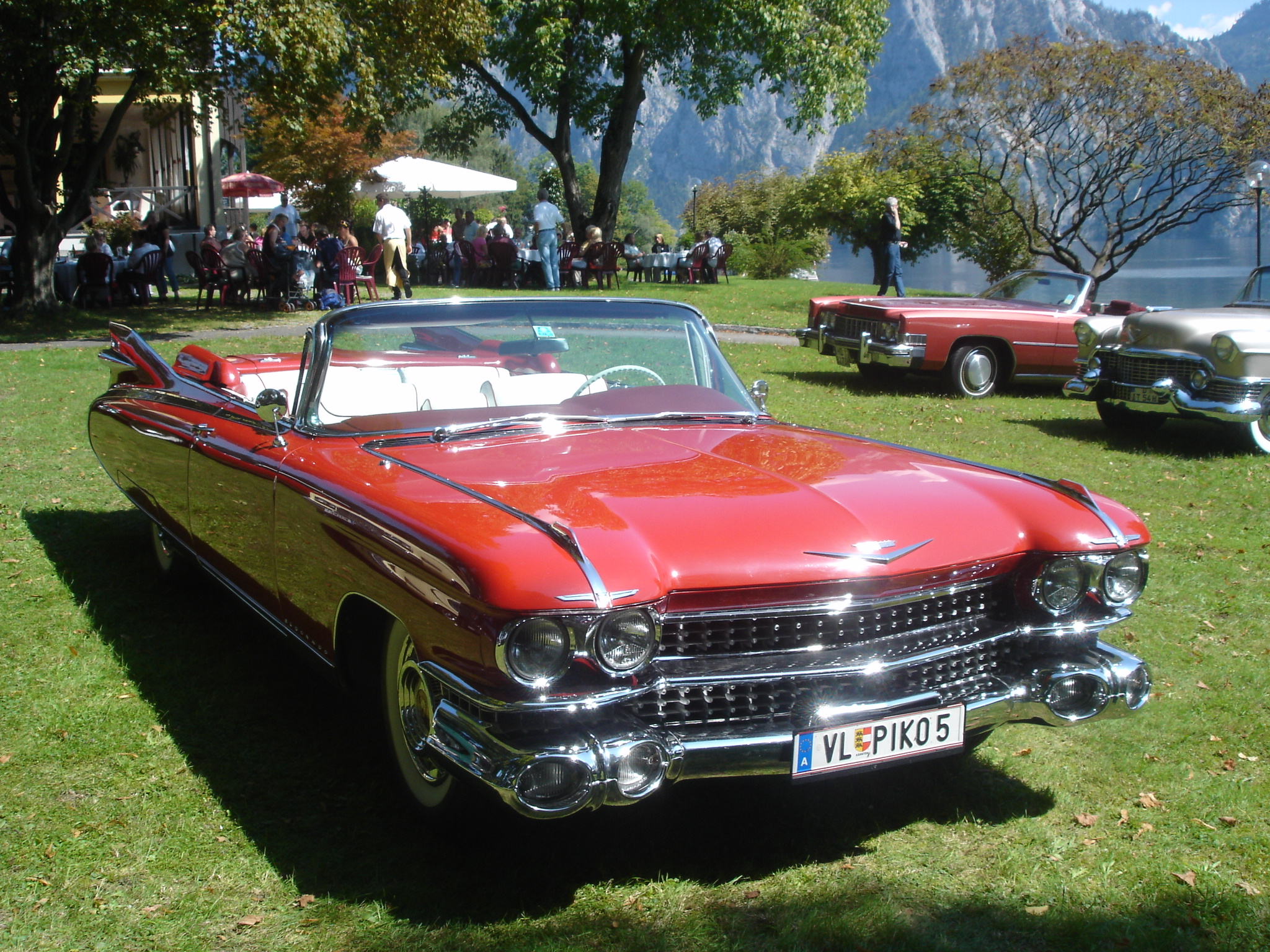 Cadillac Eldorado aus 1959 in red